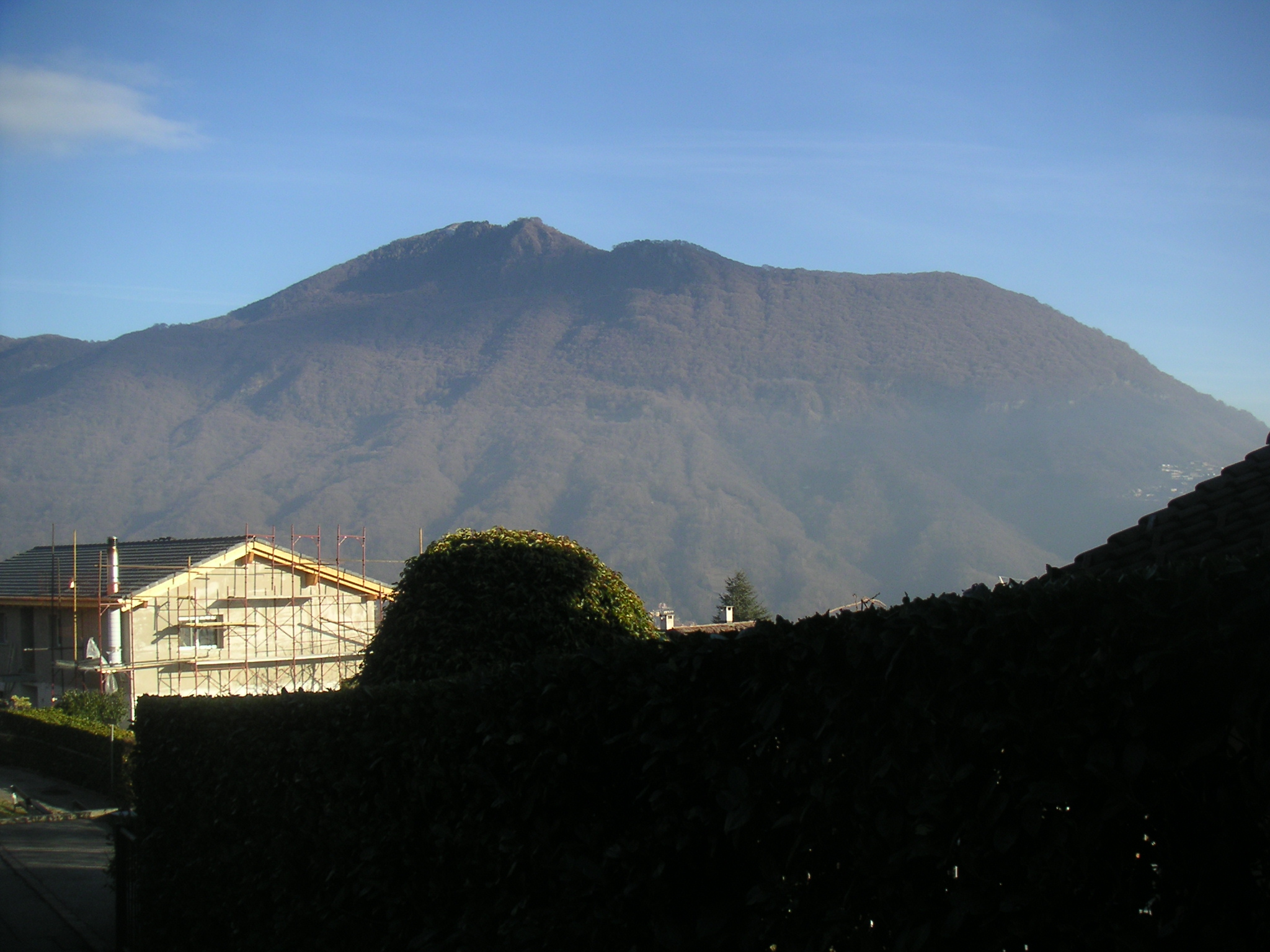 Foo del Monte Boglia, di Fernando Pescia